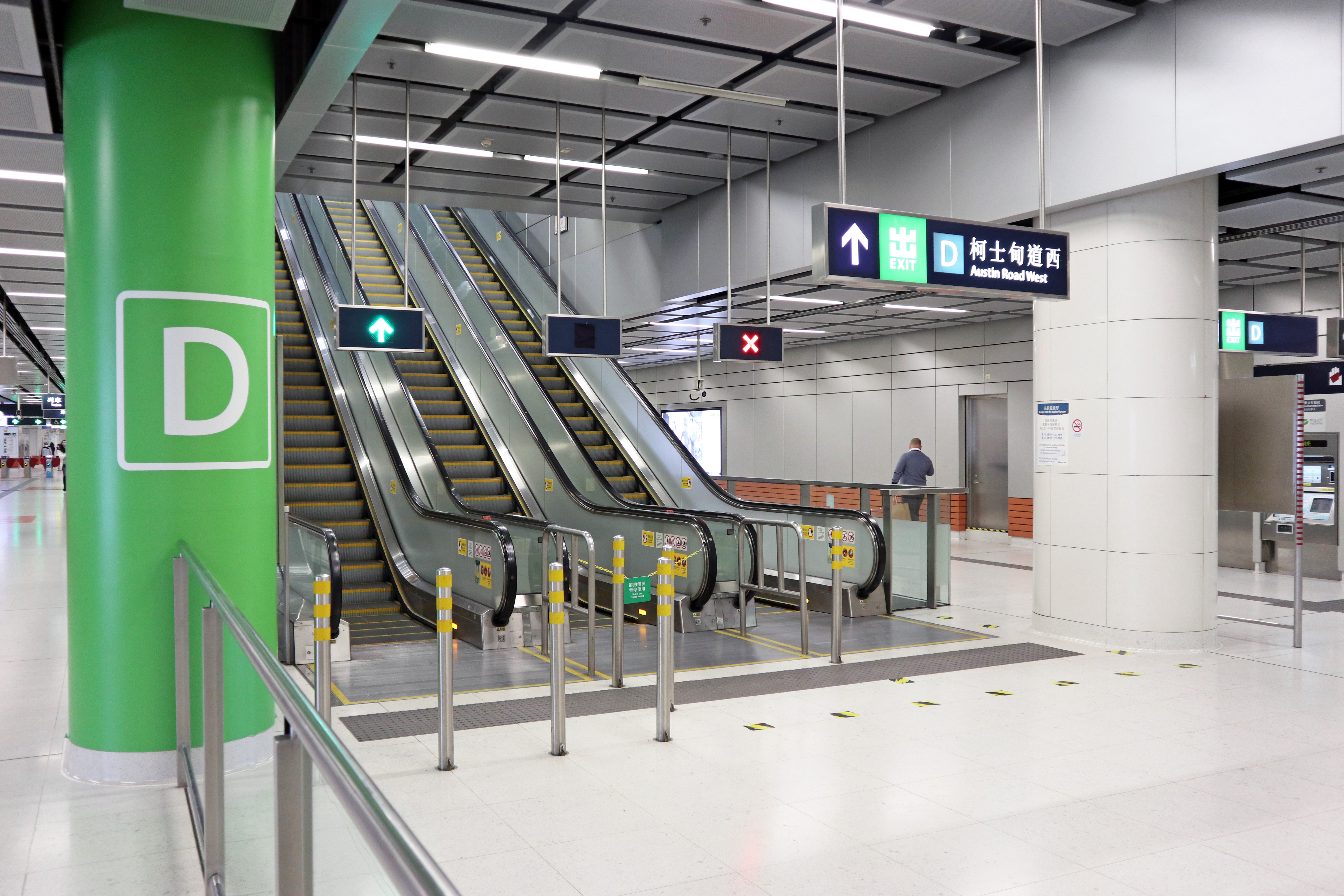 港鐵柯士甸站D出入口扶手電梯通道